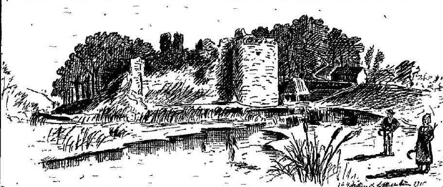 Ruines du château de Corlay en 1896 (dessin, J. Baudry, La Fontenelle le ligueur et le brigandage en Basse-Bretagne pendant la Ligue